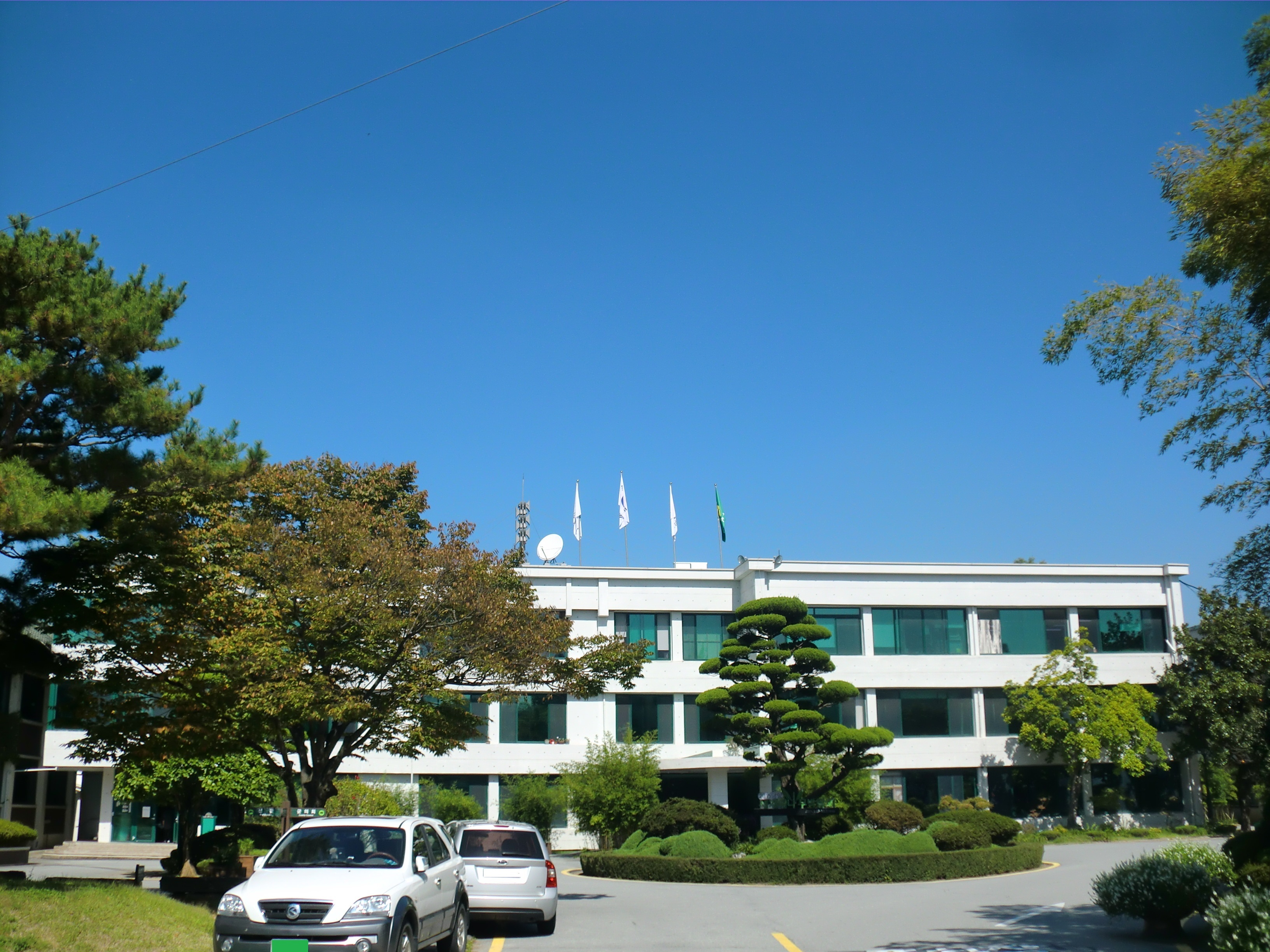 전라남도 담양군에 있는 담양군청